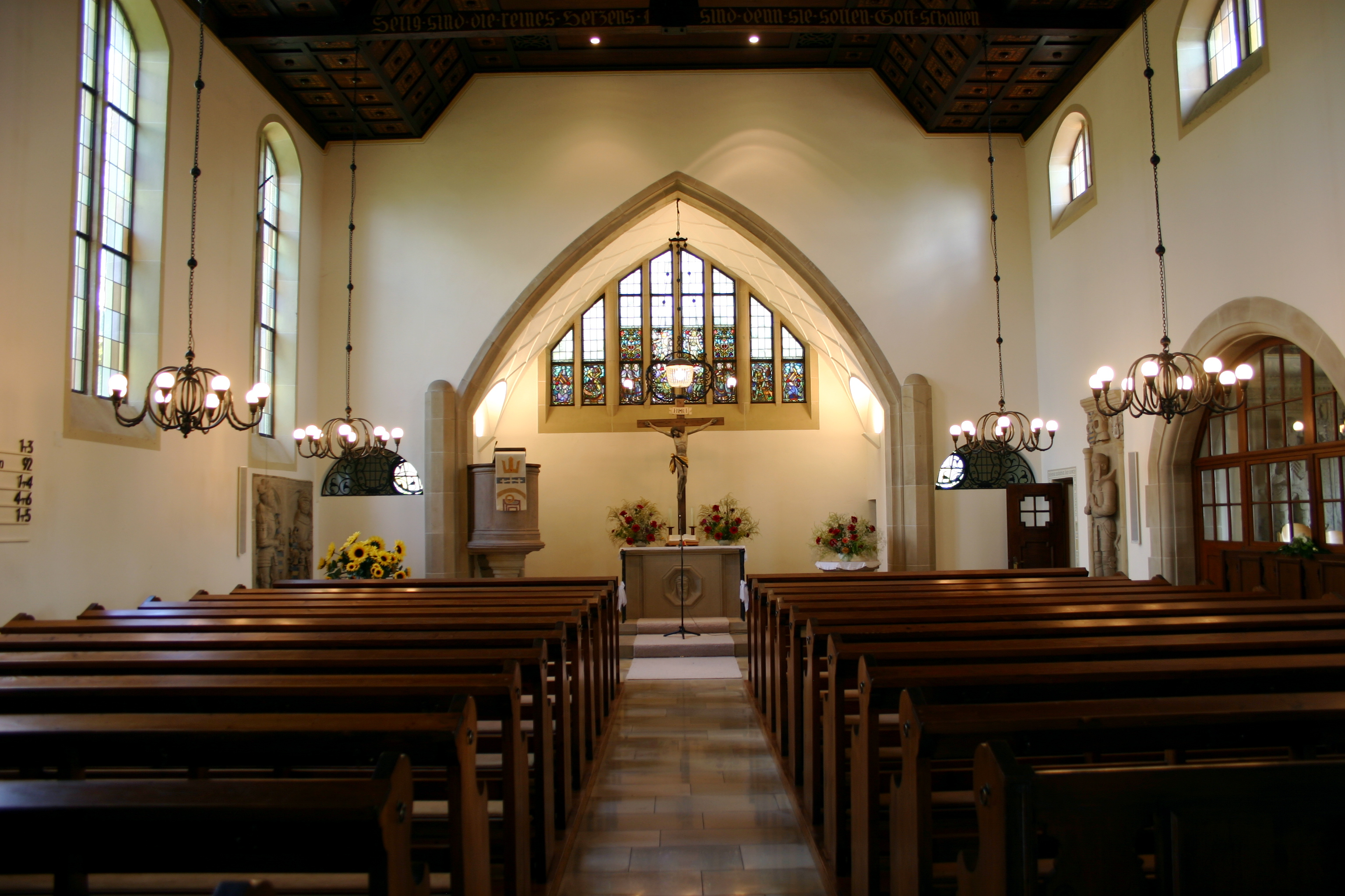 Evangelische Georgskirche zu Massenbach (Schawaigern) mit Baronloge (rechts)